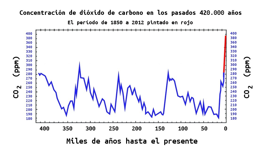 Gráfico de la concentración de dióxido de carbono desde hace 420.000 años hasta la actualidad. El período de 1850 a 2012 está pintado en rojo y evidencia el impacto antropogénico desde la revolución industrial.